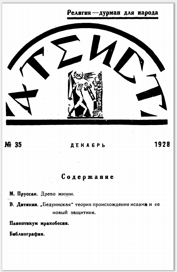 Журнал Атеист